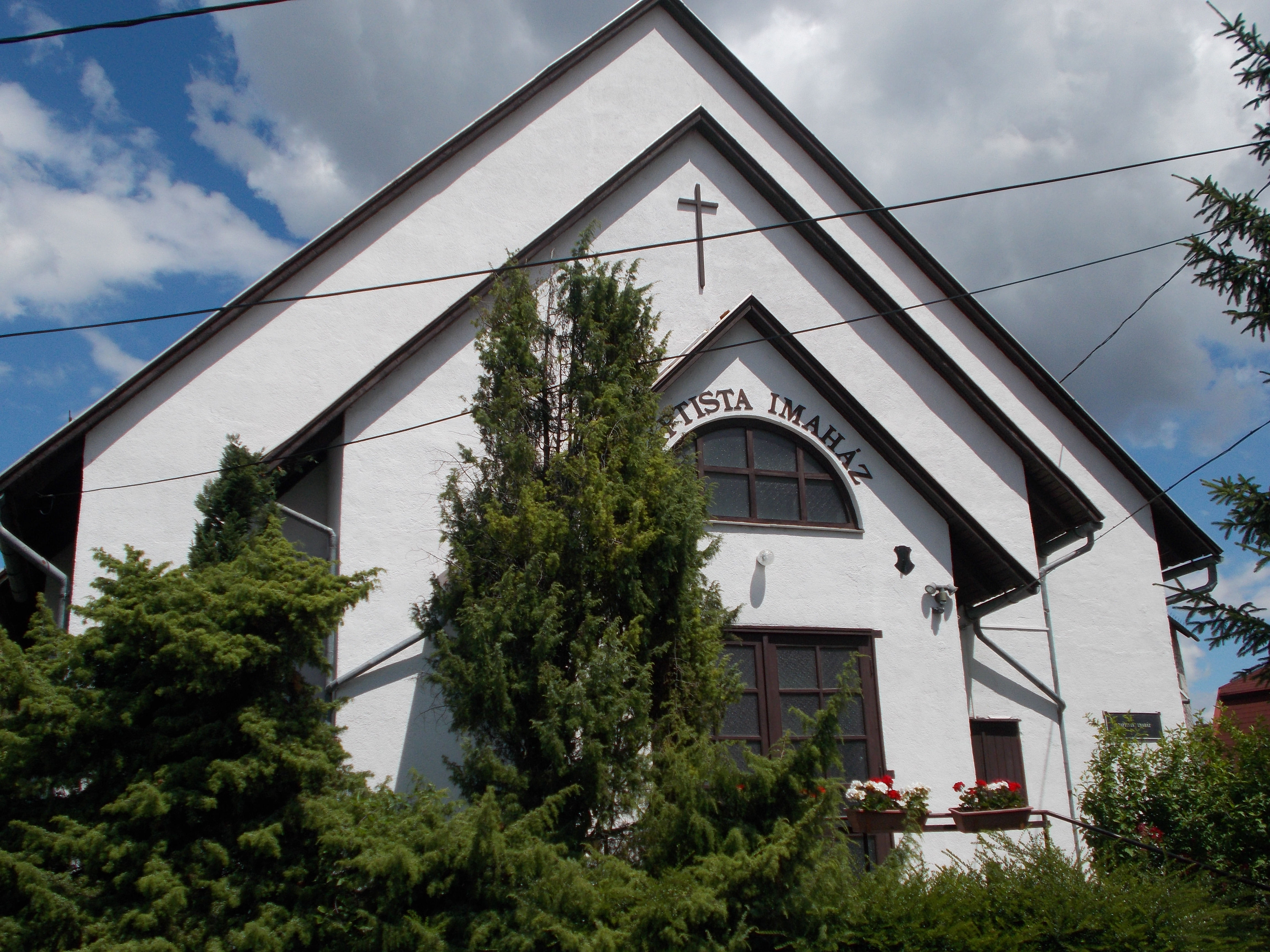 Baptista templom. Utcai homlokzat. - Szentendre, Rákóczi Ferenc utca 27